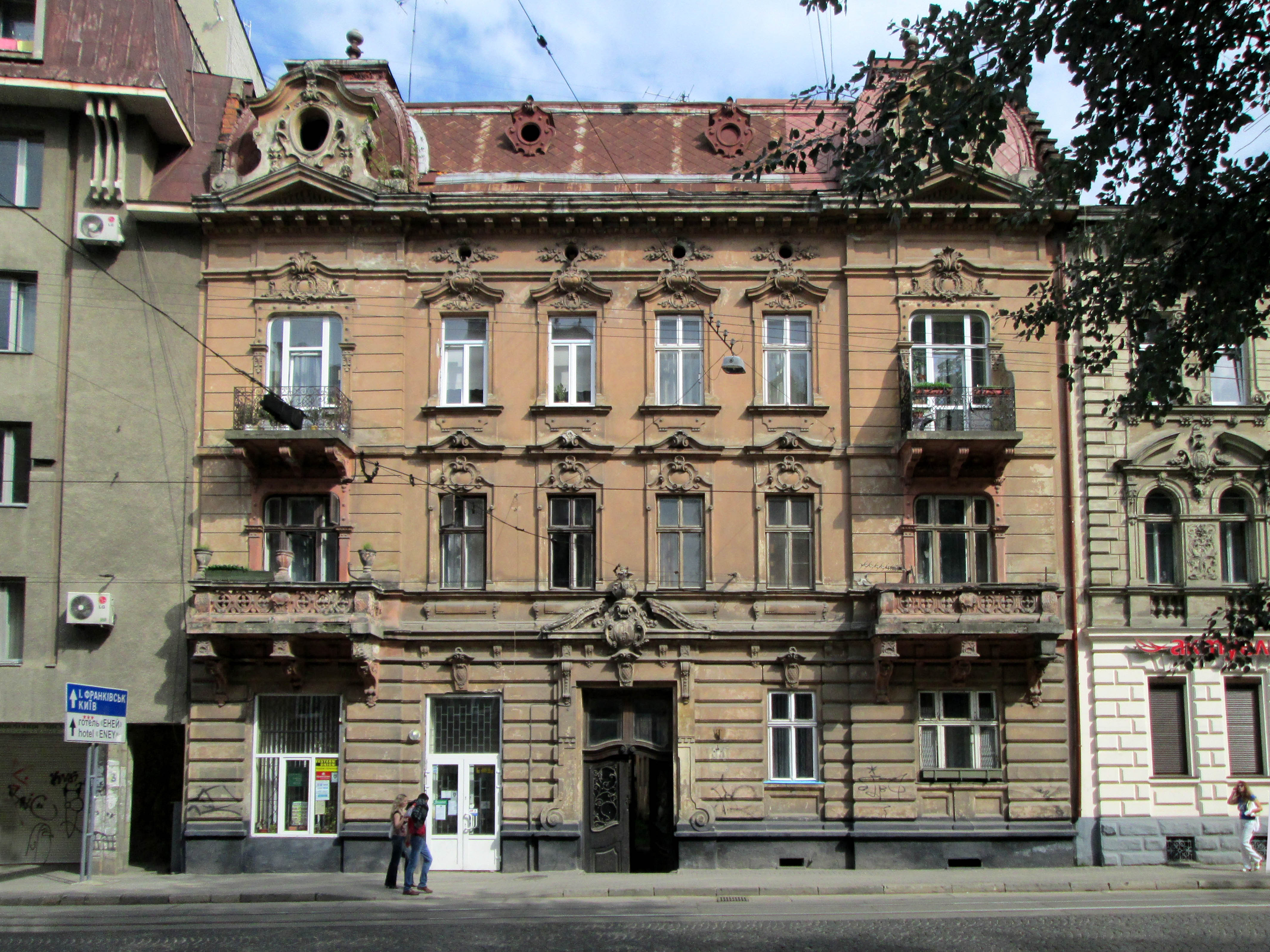 Будинок на вулиці Франка, 63 у Львові.